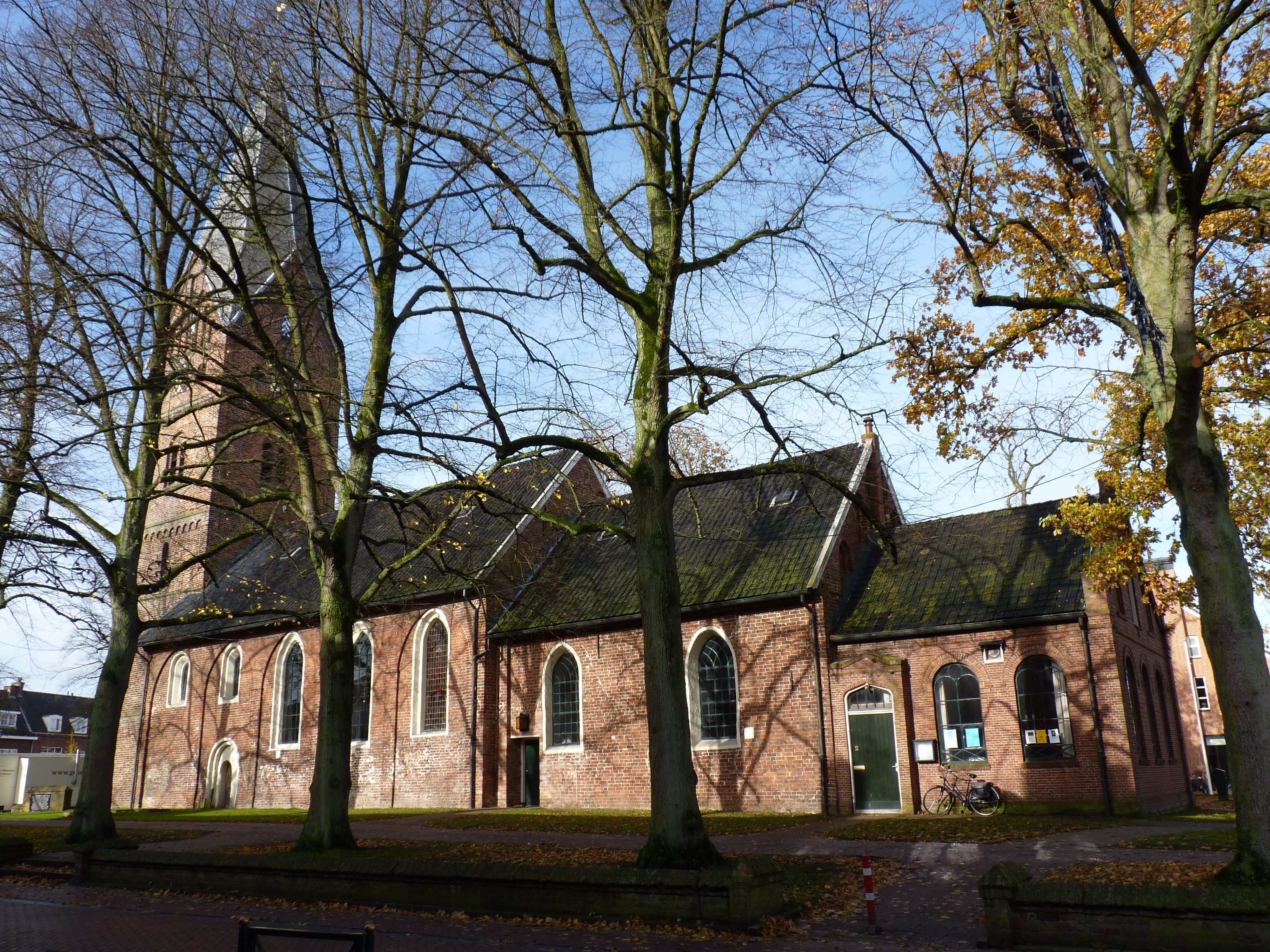 Haren Dorpskerk